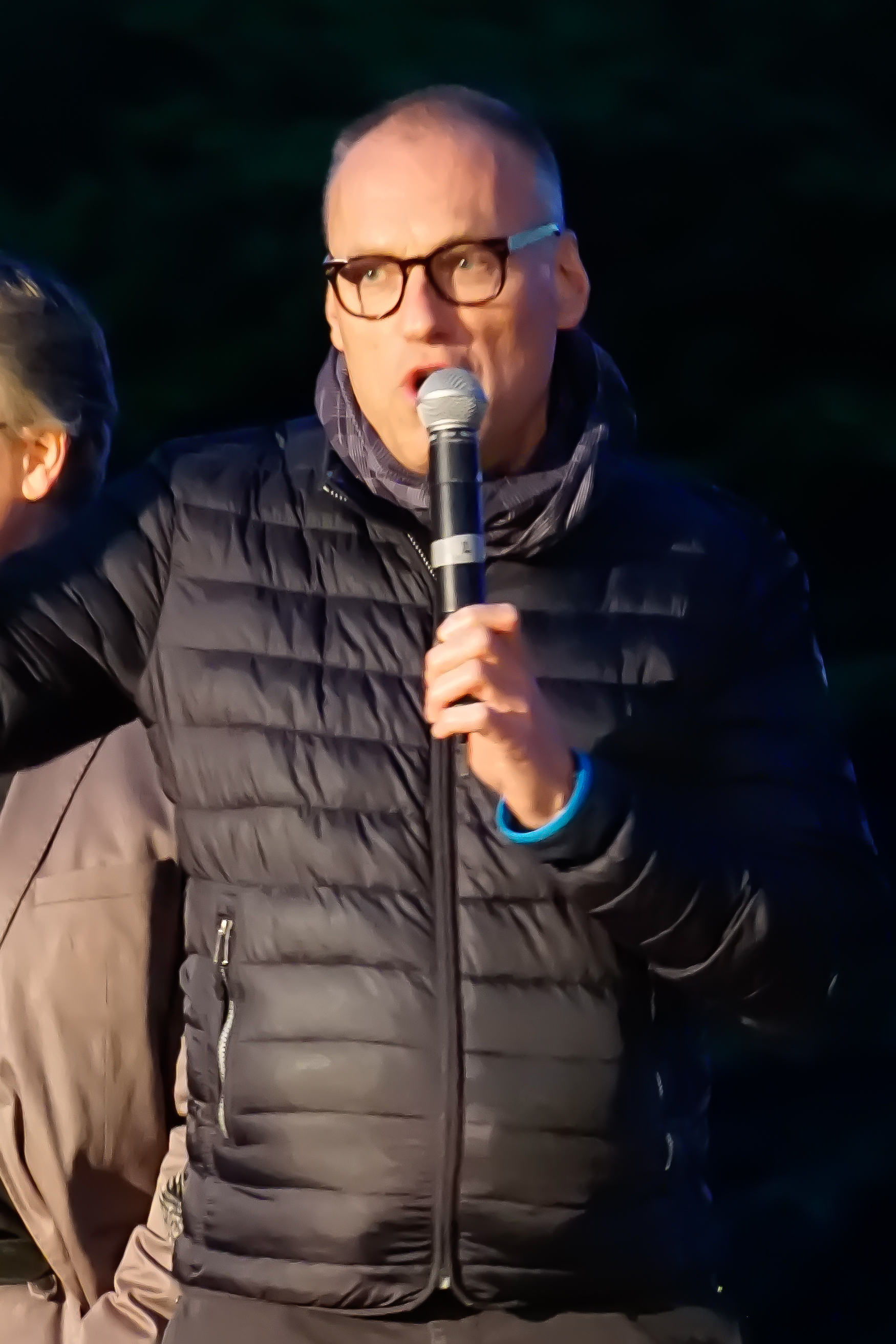 Tatort-Dortmund, Vorpremiere für die Folge 9 "Zahltag" beim Openairkino im Westfalenpark: Thomas Jauch (Regisseur)